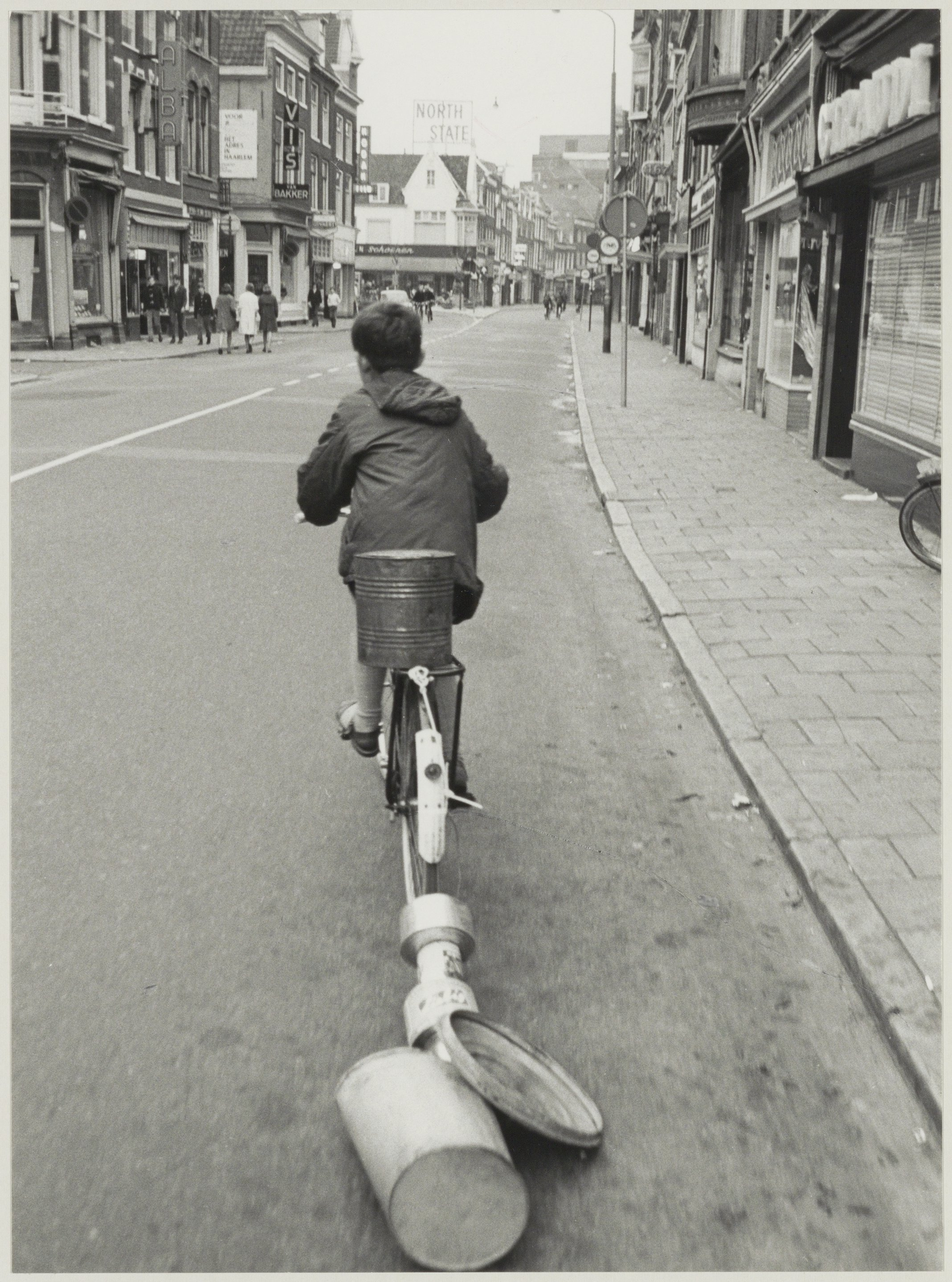 CollectieCollectie Fotoburo de BoerInventarisnummerNL-HlmNHA_54011711BeschrijvingLuilak. Lawaai makende jongen in de Grote Houtstraat, ziende naar het noorden.FotonummerNL-HlmNHA_1478_1592DocumenttypeHistorieprenten, tekeningen en foto'sVervaardigerBoer, Cees de (1918-1985) Soort vervaardigerFotograaf LandNederland ProvincieNoord-Holland GemeenteHaarlem PlaatsHaarlem StraatGrote Houtstraat GeografischCentrum Begindatum1964Einddatum1966TechniekFoto Trefwoordenstraatgezichten, winkelstraat